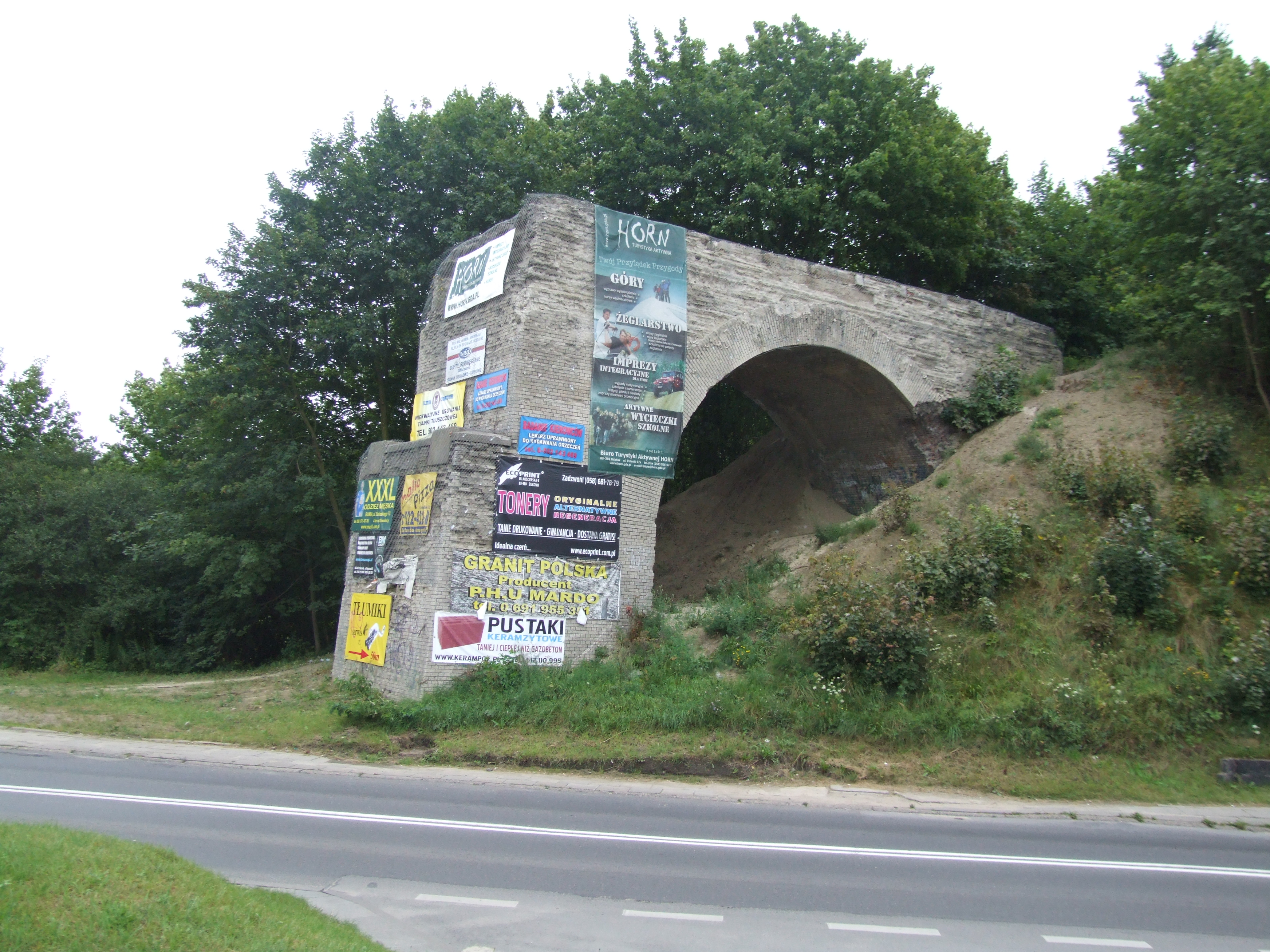 Gdańsk - zniszczony wiadukt kolejowy przy ul. Słowackiego.